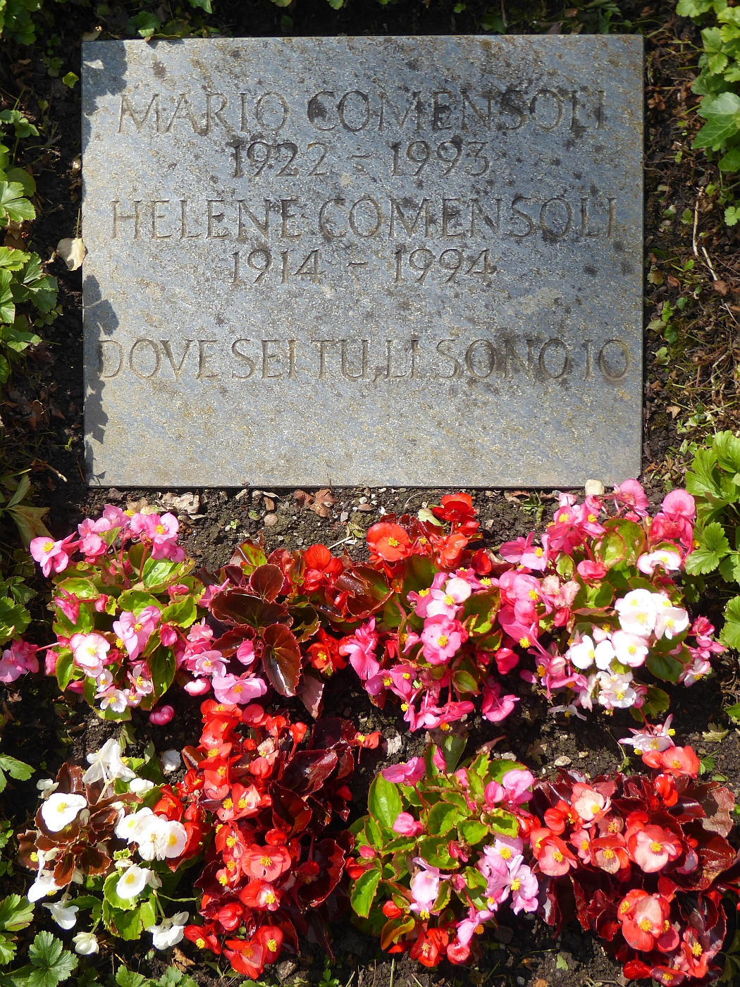 Mario Comensoli (1922–1993) Maler und Grafiker. Plastik. Gesellschaftskritische Motive. Helene Comensoli (1914–1994) Grabinschrift, Dove sei tu, li sonoio, auf dem Friedhof Witikon, Zürich